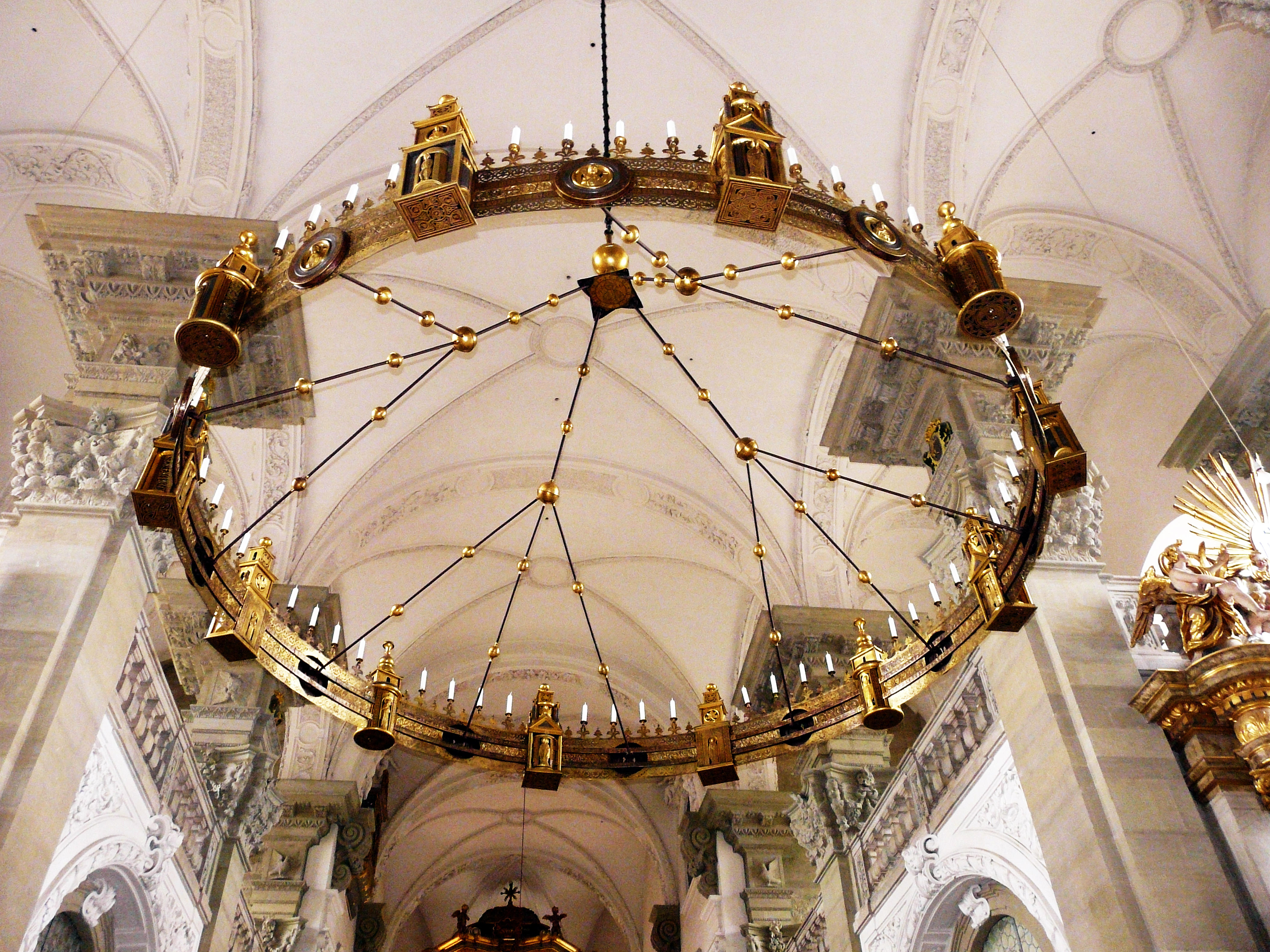 Радиальный светильник